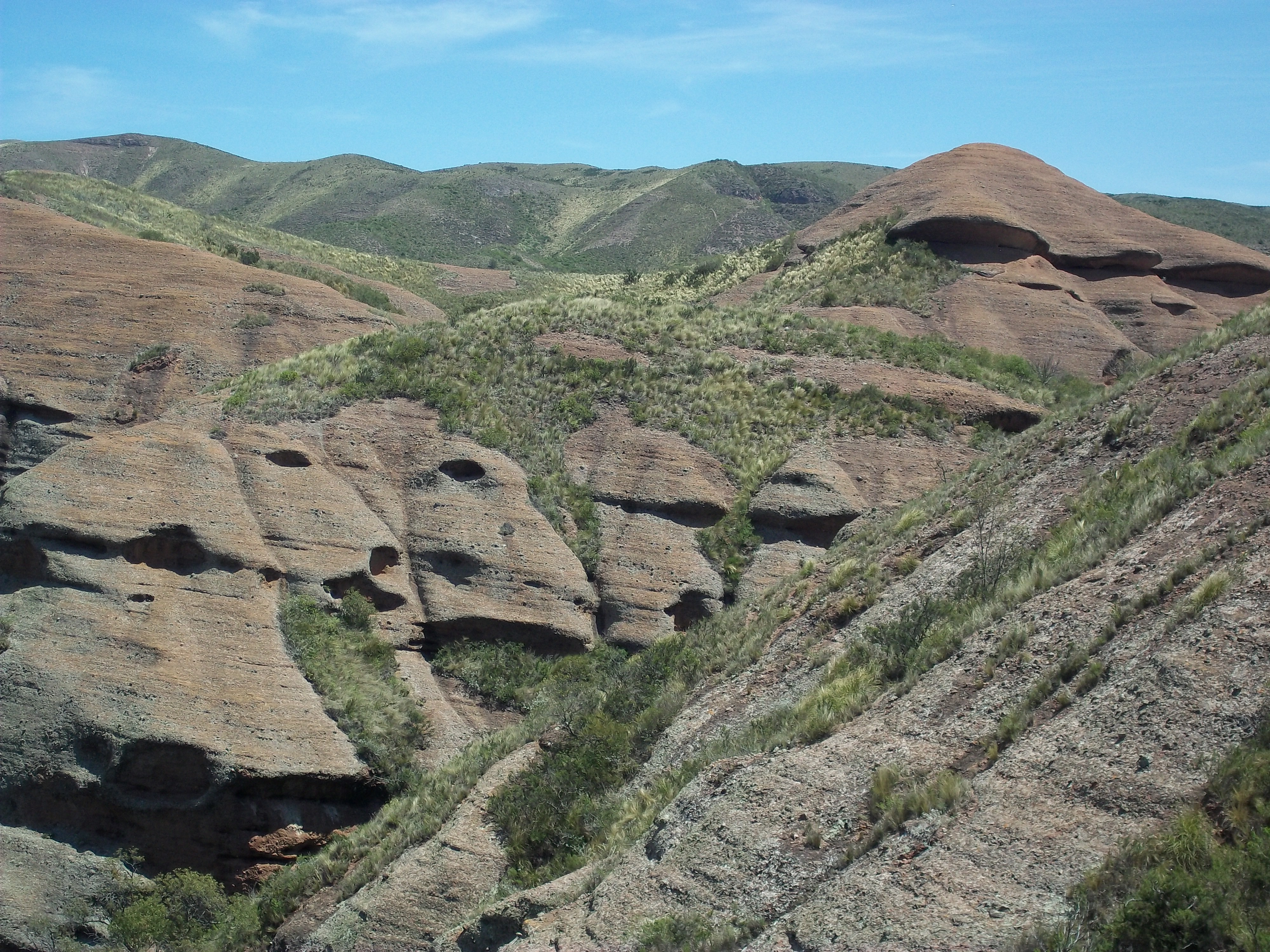 una de las bellezas naturales de la provincia de córdoba, argentina, hábitat de los indios comechingones.